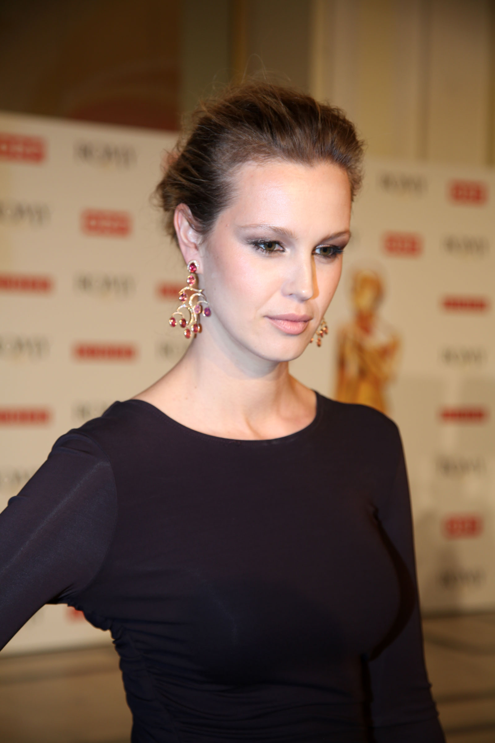 Scheriau_Melanie-2916